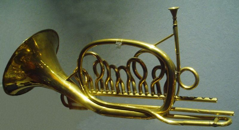 Minden hangnemben játszható kürt